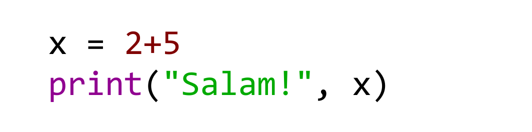 سلام به زبان پایتون